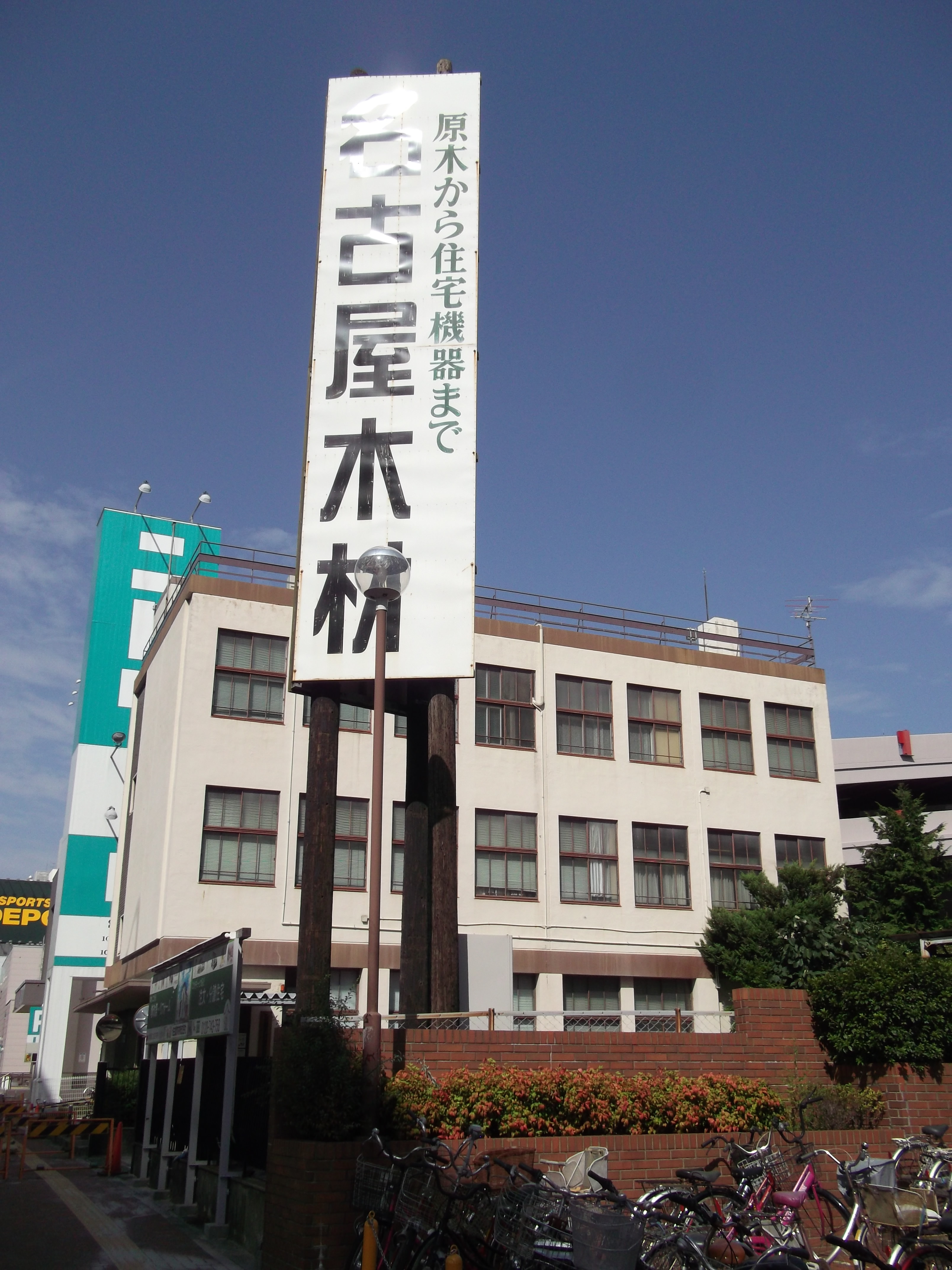 名古屋市中川区の名古屋木材本社を西側公道南側より撮影